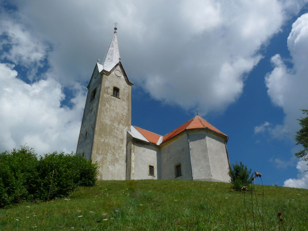 Sv. Križ nad Planino pri Sevnici